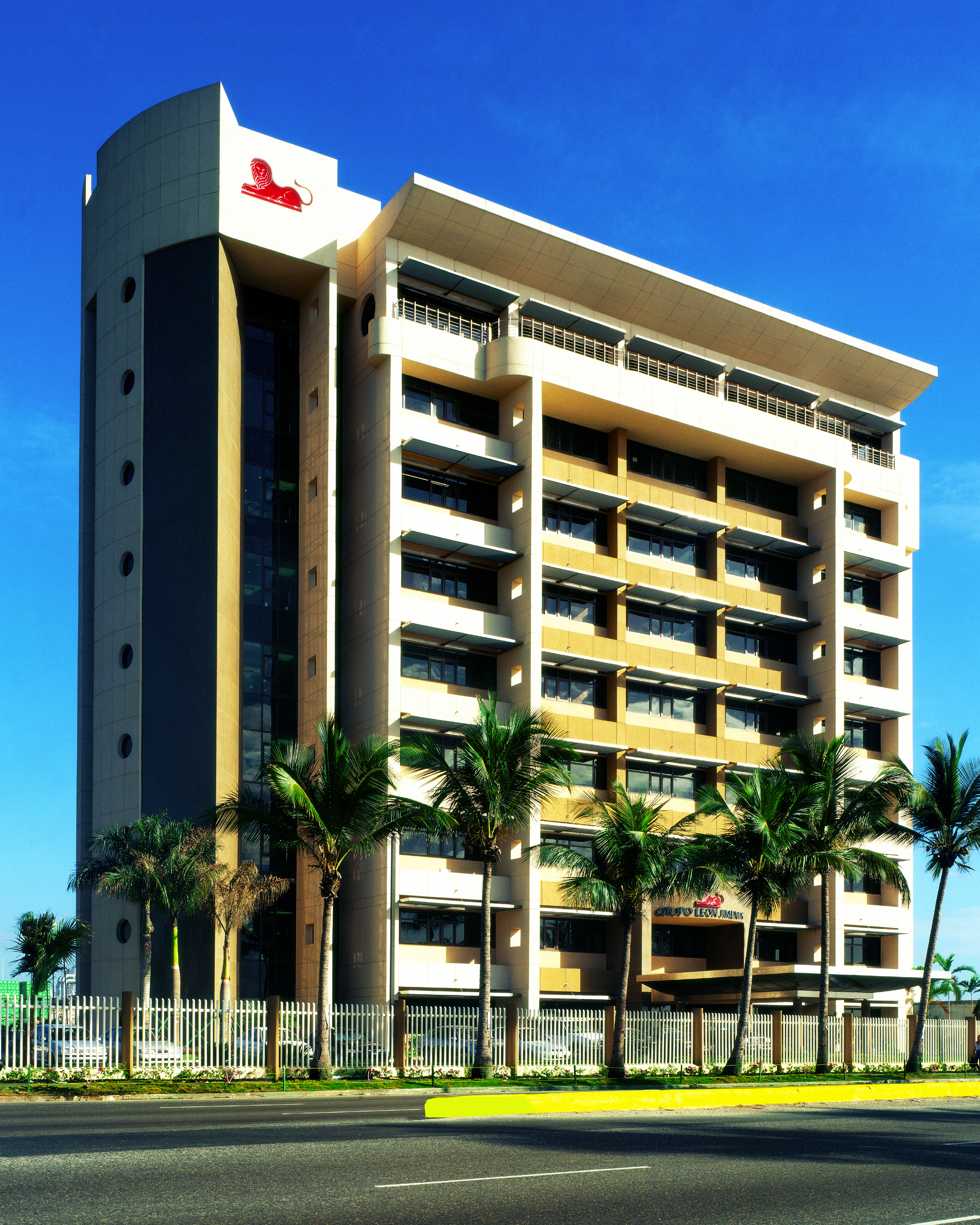 Edificio Corporativo Grupo León Jimenes